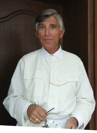 Prof. dr hab. Bazyli Degórski, O.S.P.P.E.